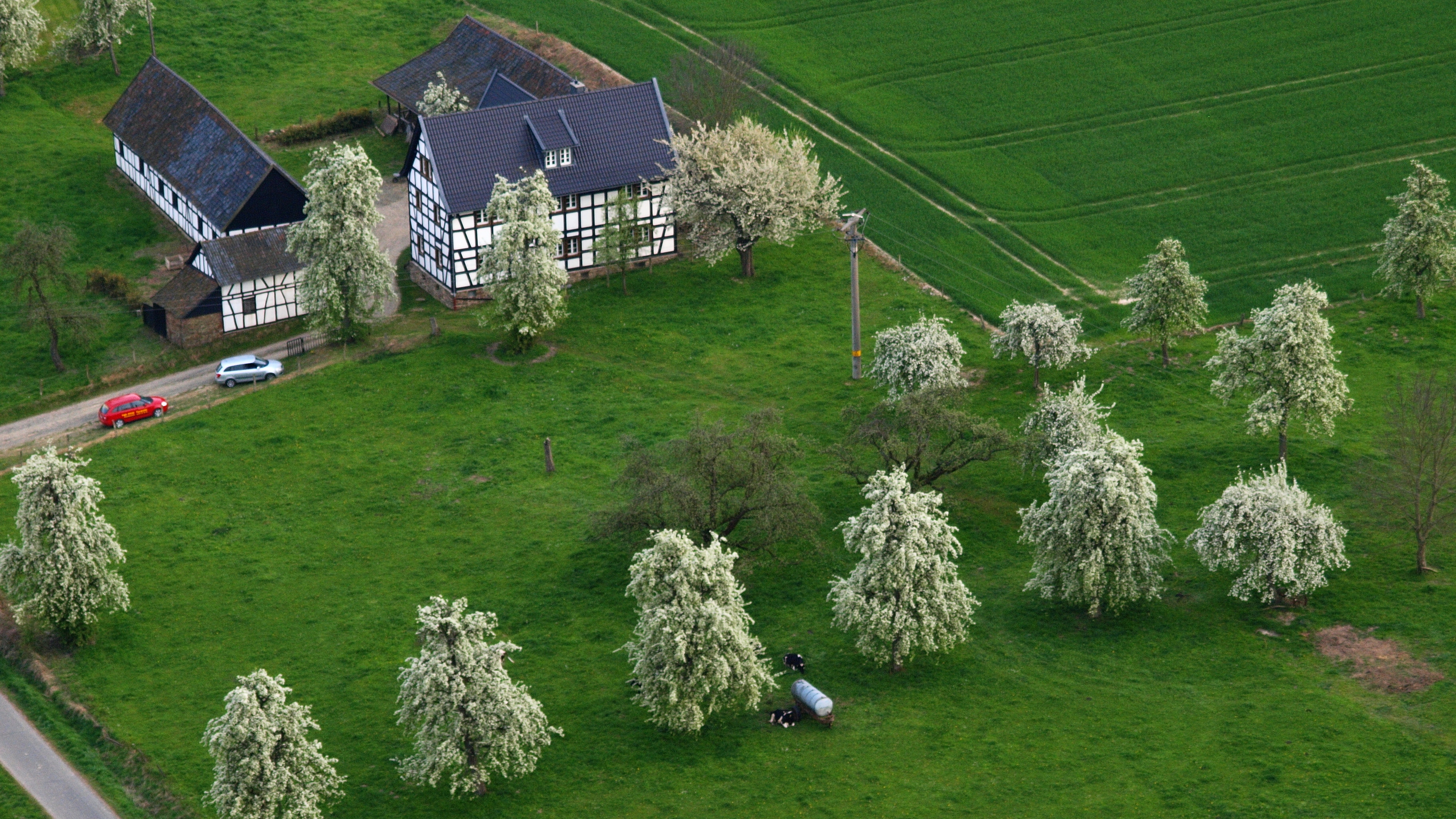 Denkmalgeschützte Fachwerkhofanlage, In der Dränk 21, Süchterscheid, Hennef (Sieg): Luftaufnahme